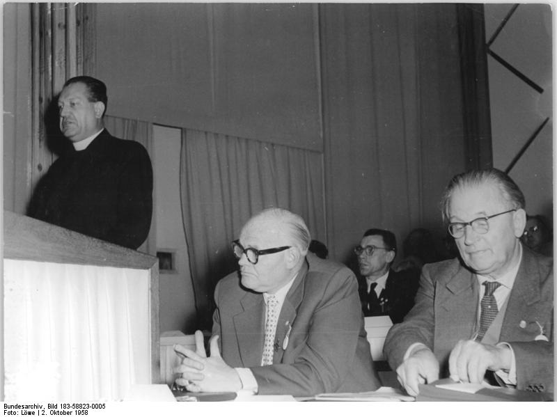 Zentralbild Löwe 2.10.1958 - 9. Parteitag der CDU in Dresden 2. Tag: UBz: Das Ehrenmitglied der CDU und Minister für Gesundheitswesen der CSR, Dr. Josef Plojhar während seiner Ansprache.